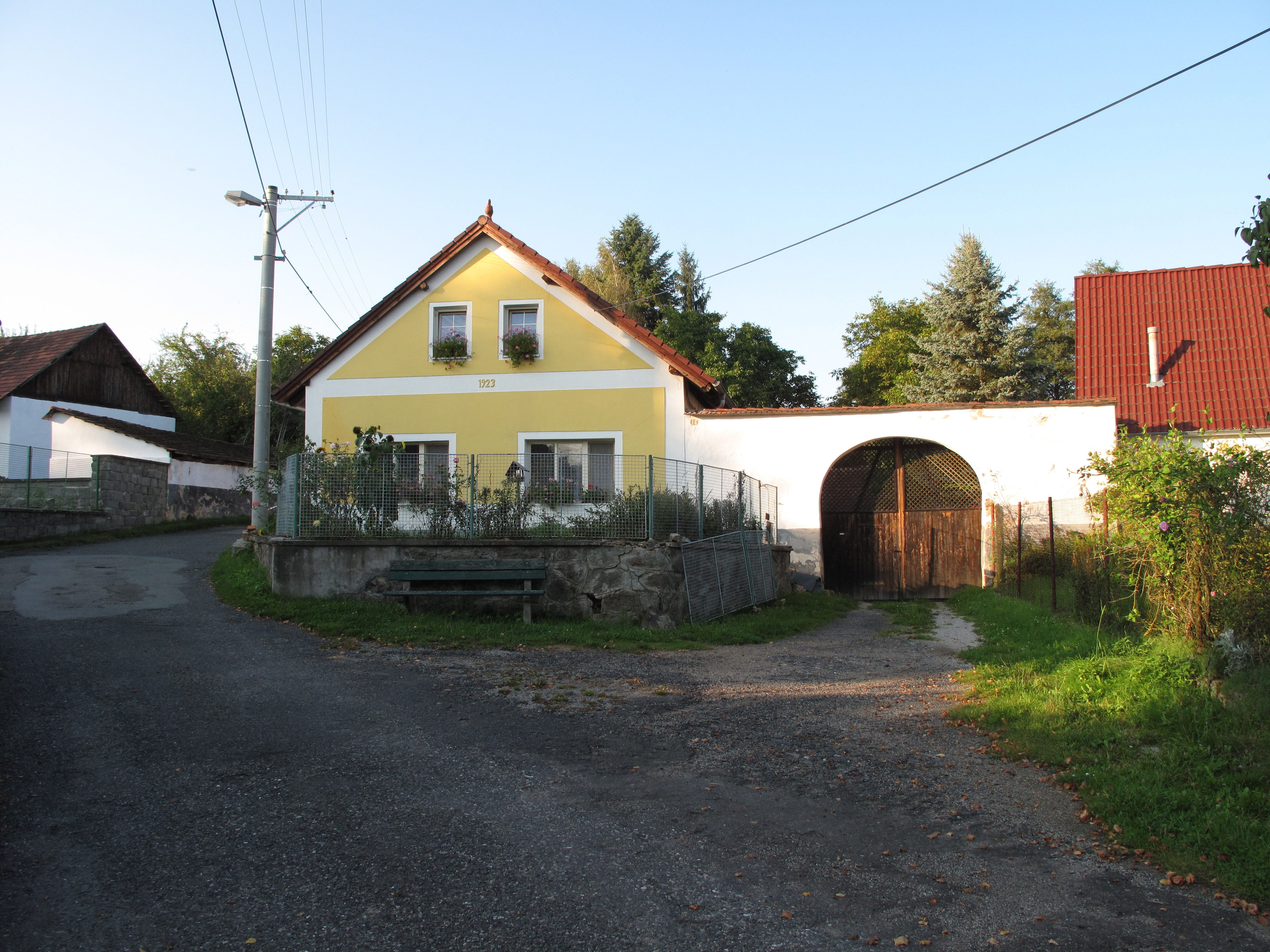 Dům a vrata ve Výšicích. Okres Strakonice, Česká republika.